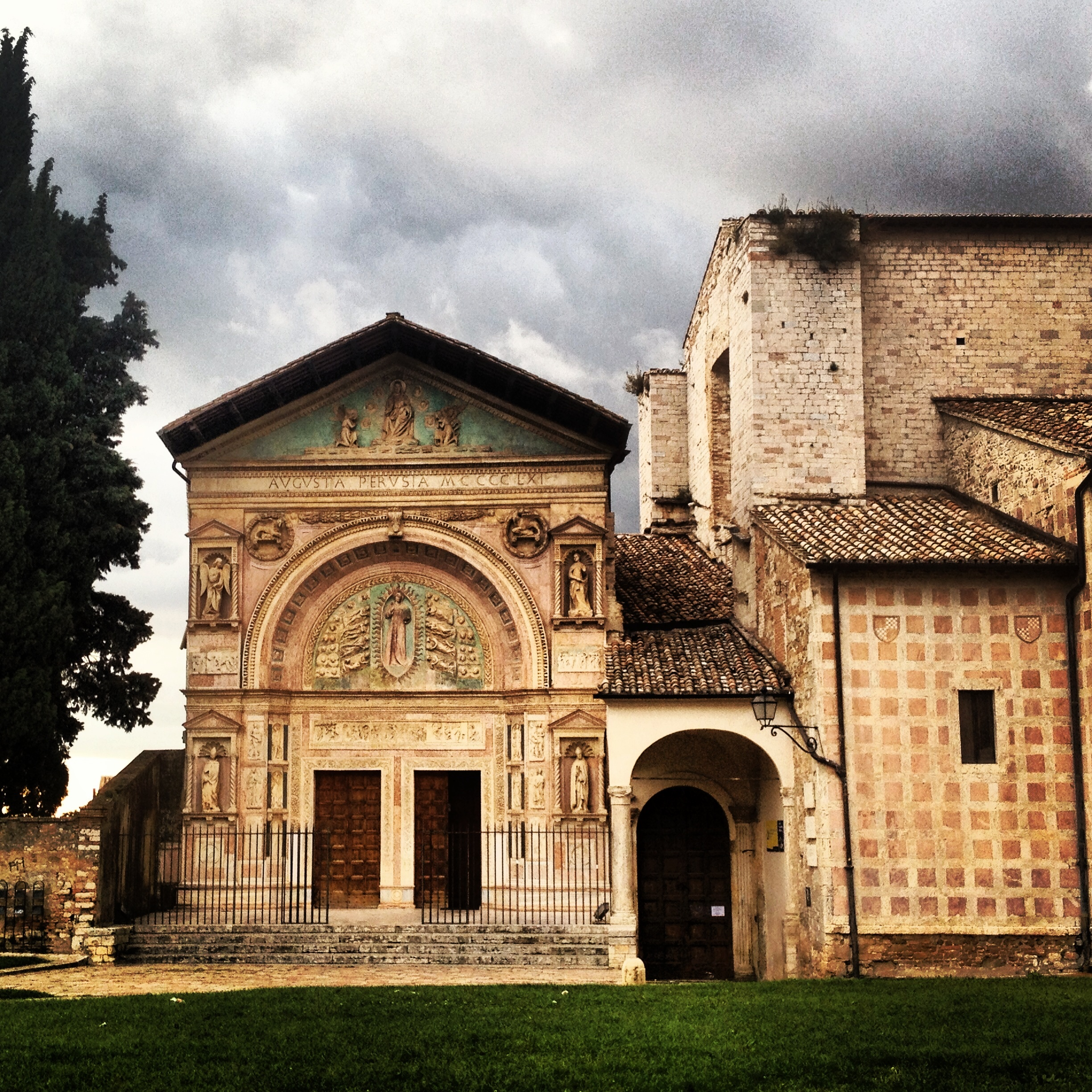 Complesso di San Francesco al Prato This is a photo of a monument which is part of cultural heritage of Italy.